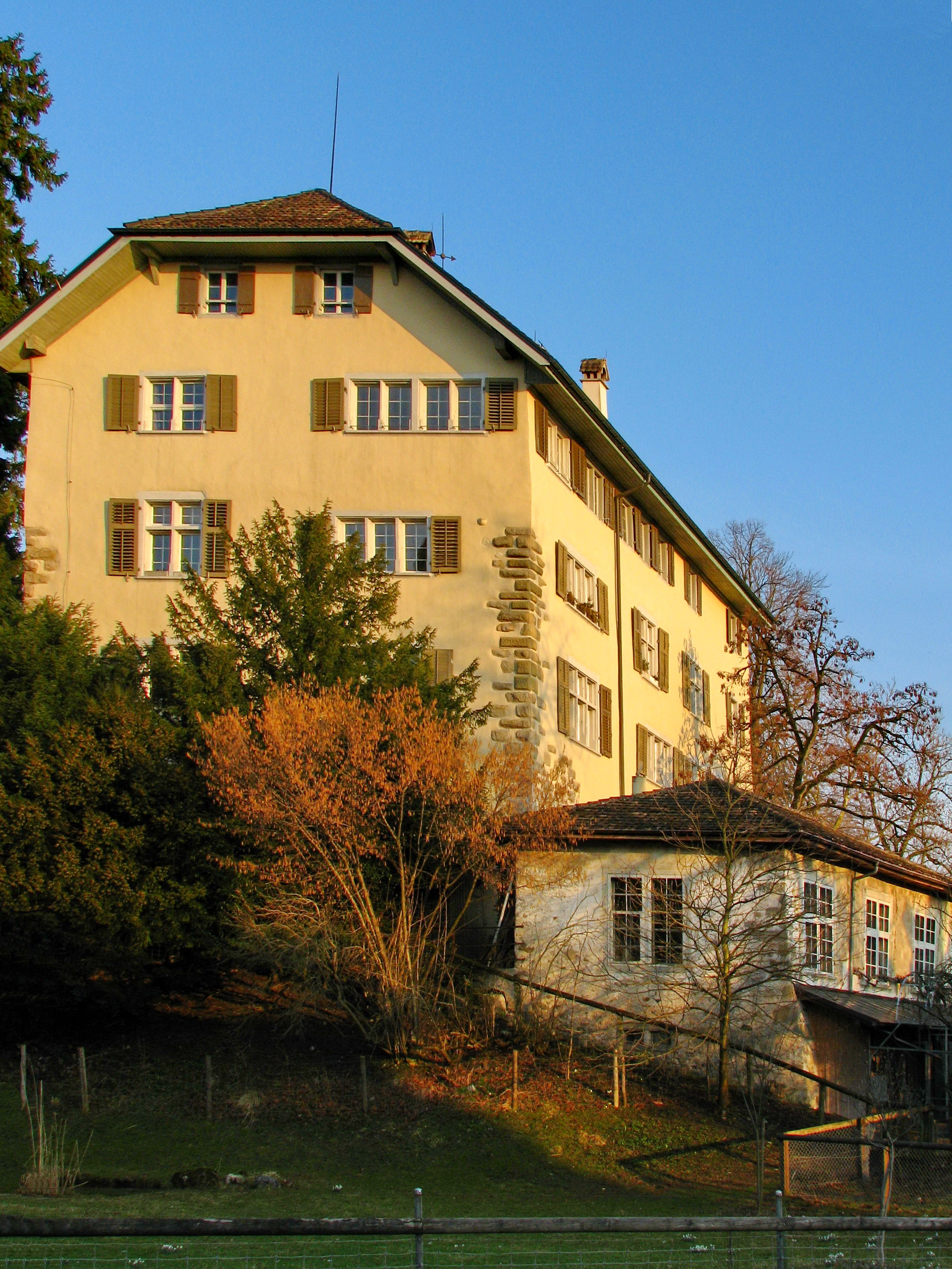 Schloss in Wetzikon (Switzerland)